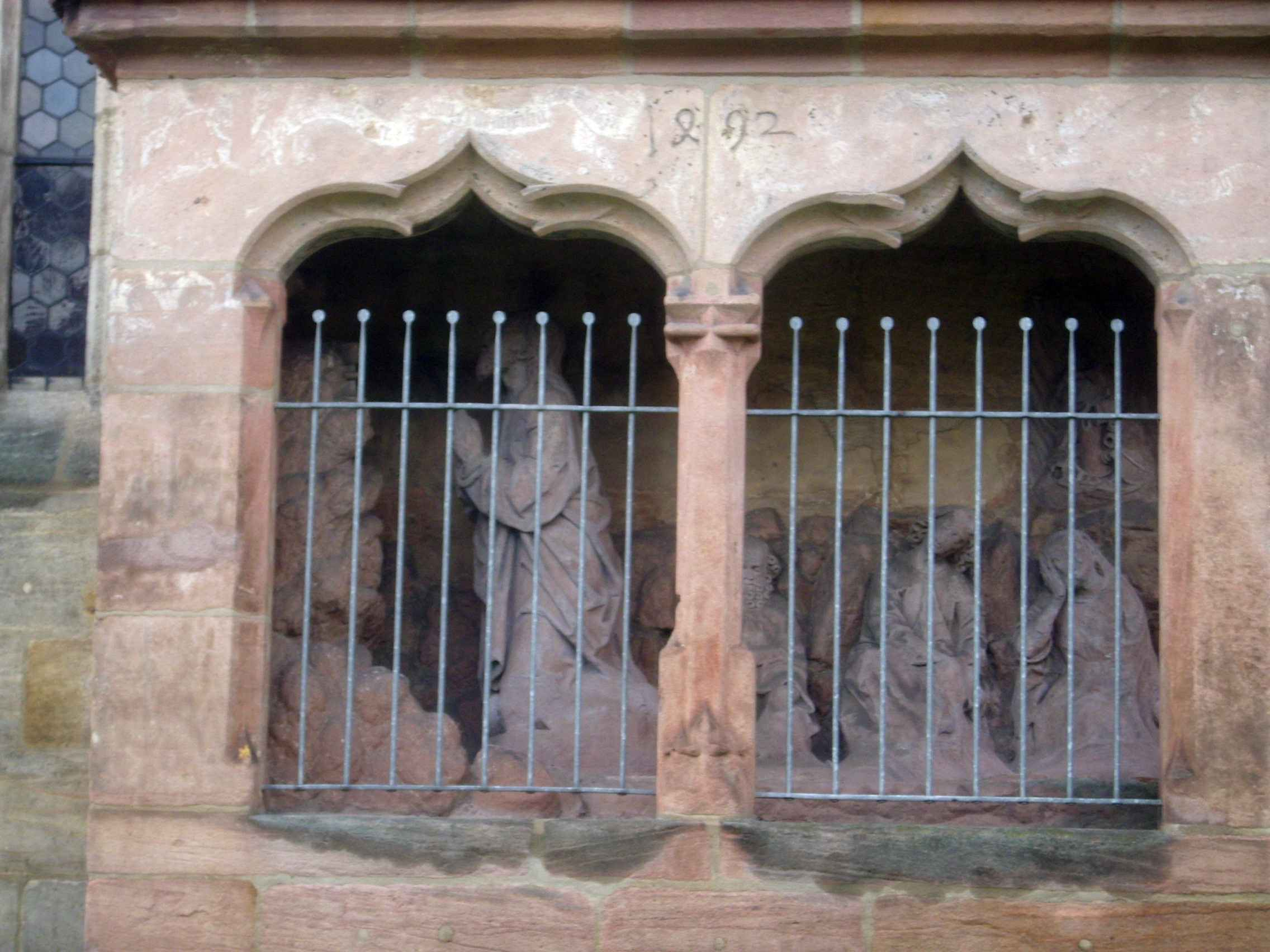 Neunkirchen am Brand-Klosterkirche-Ölberg am Chor mit Figurengruppe in Übersicht sowie Jahreszahl 1492 in der Stirnseite-29052012